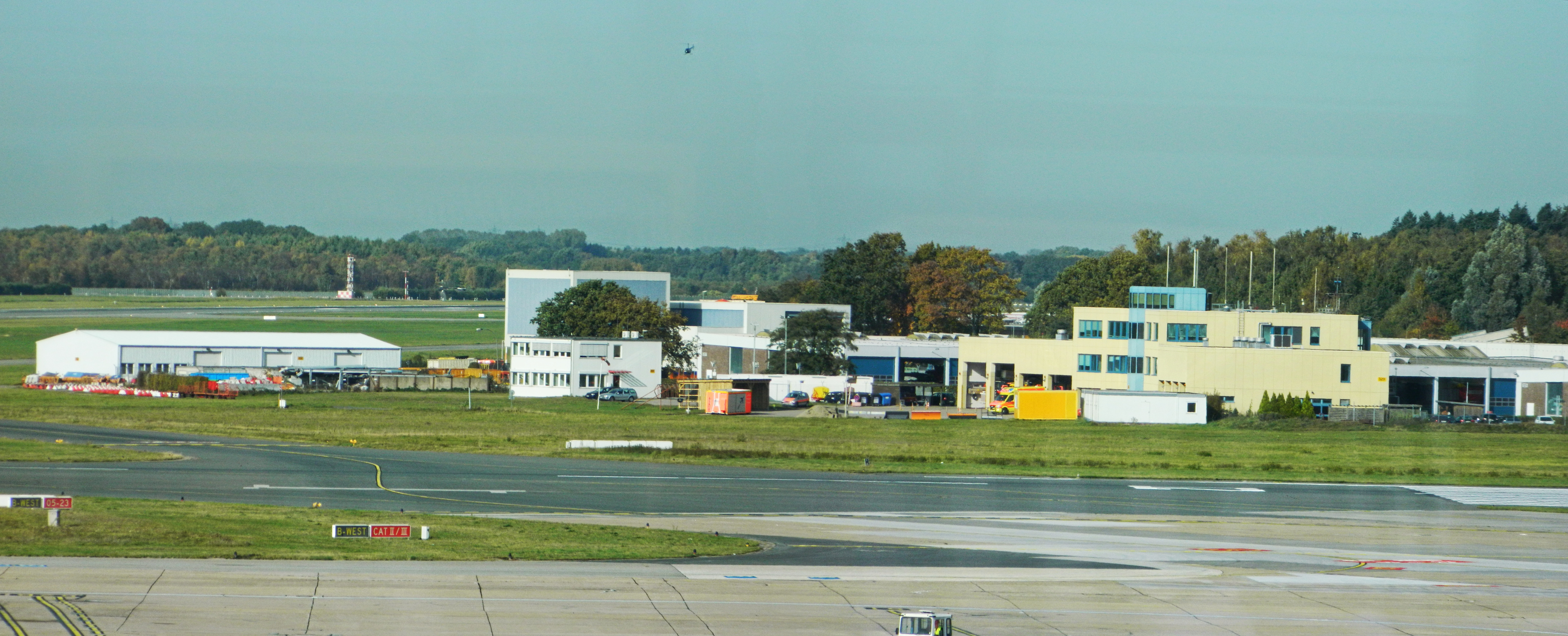 Flughafen Feuerwehr&Krankenwagen Wache